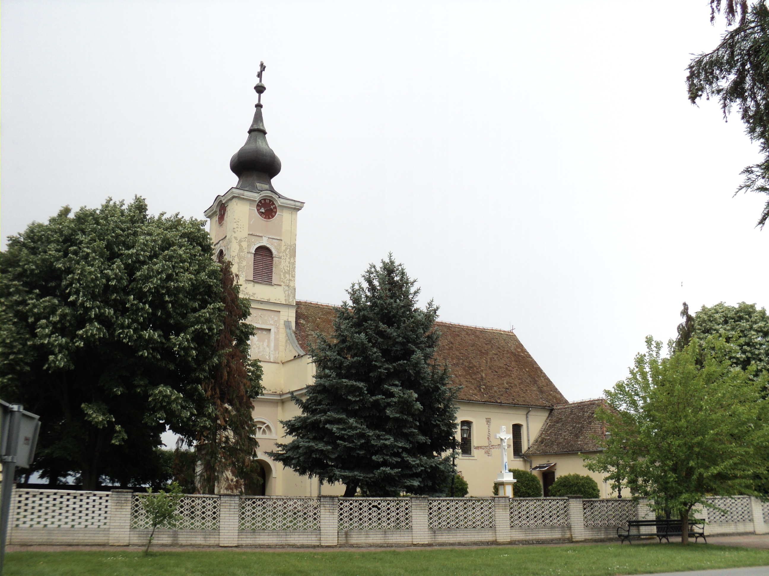 Crkva Pape Grgura Velikog, Šljivoševci.